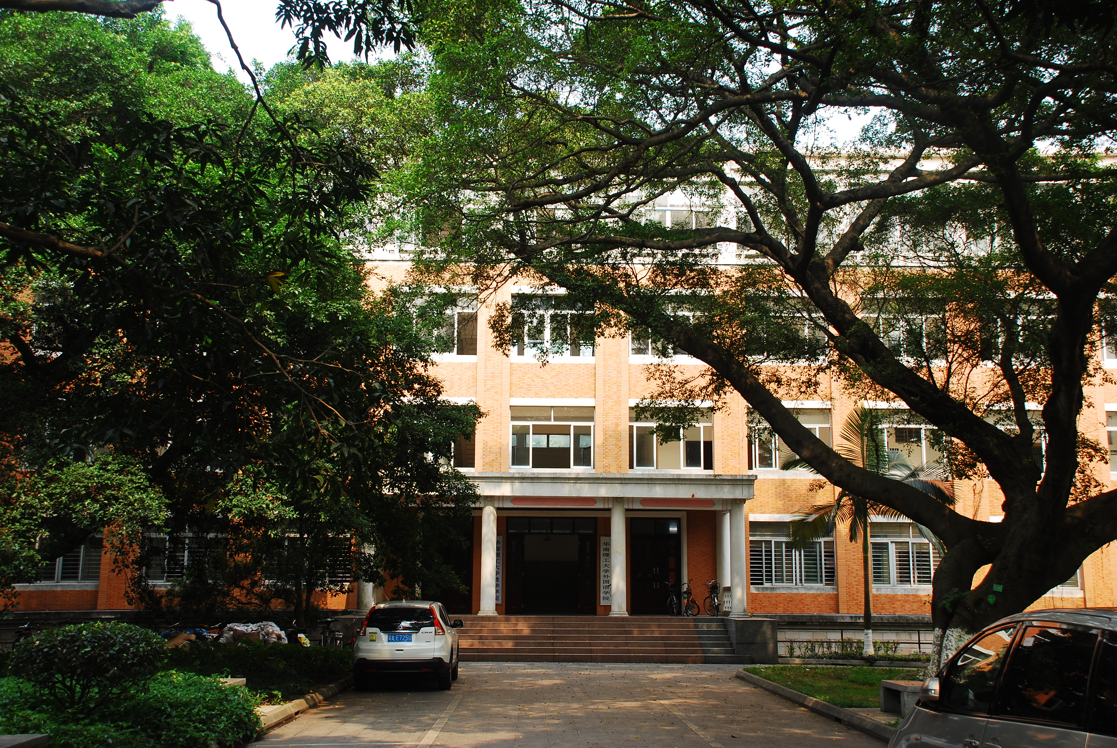 中文（中国大陆）: 华南工学院物理楼旧址，现为华南理工大学4号楼数学学院和外国语学院办公楼。位于广东省广州市天河区五山路381号华南理工大学。2014年公布为广州市历史建筑。